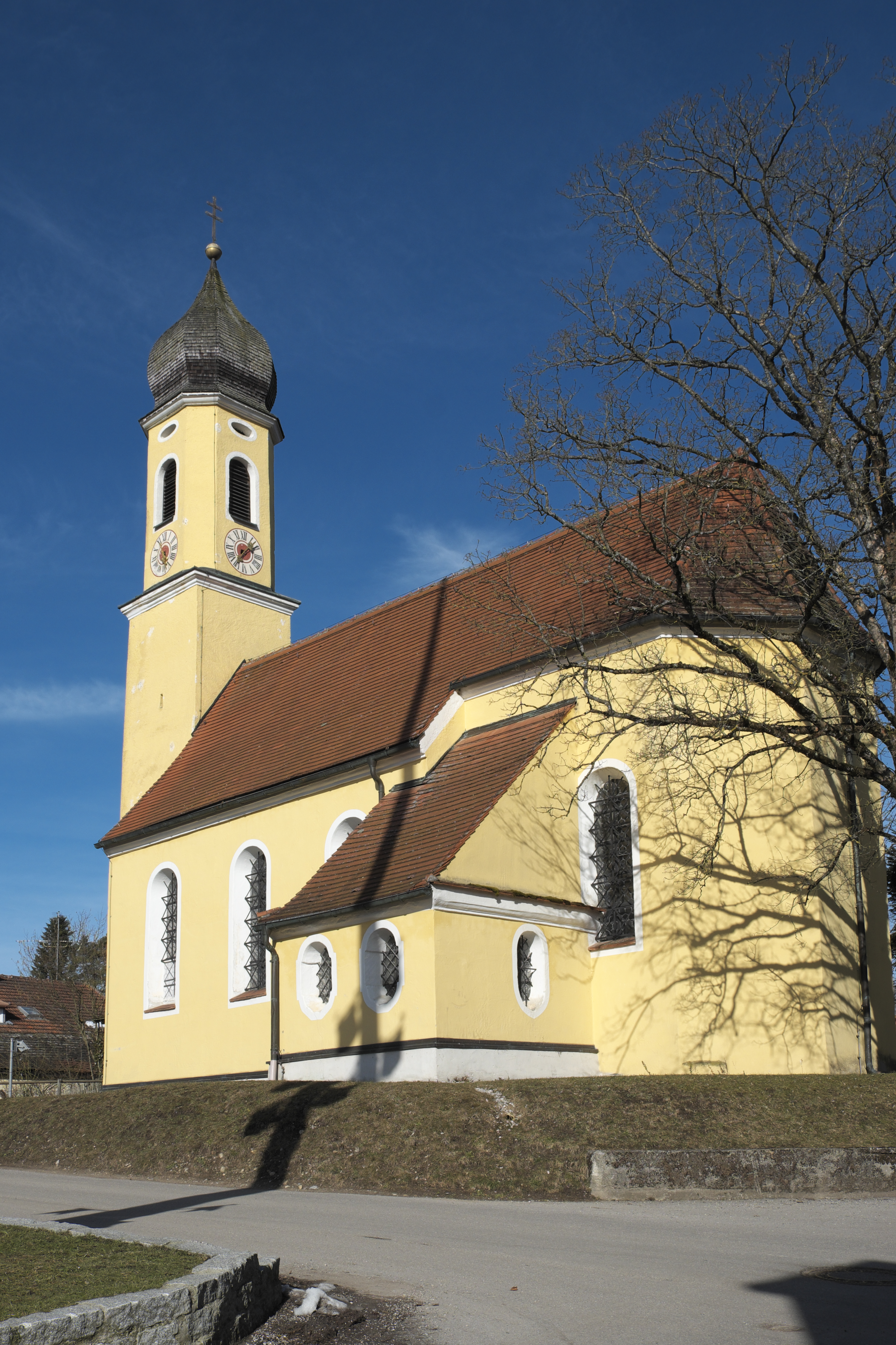 Katholische Filialkirche St. Valentin in Allmannshausen, einem Ortsteil von Berg im Landkreis Starnberg (Bayern/Deutschland)